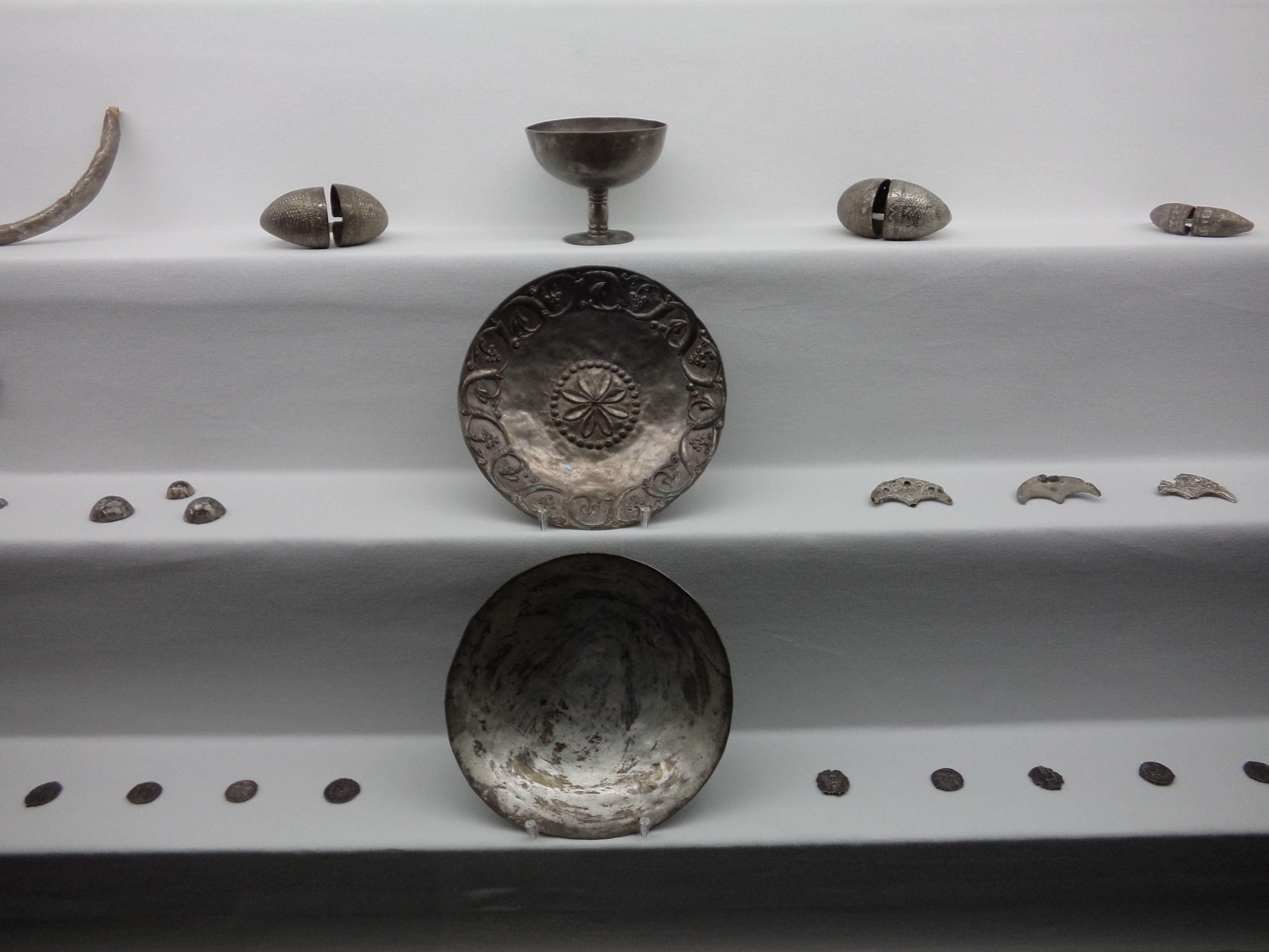 Nemesvarbóki kincslelet Pozsonyban